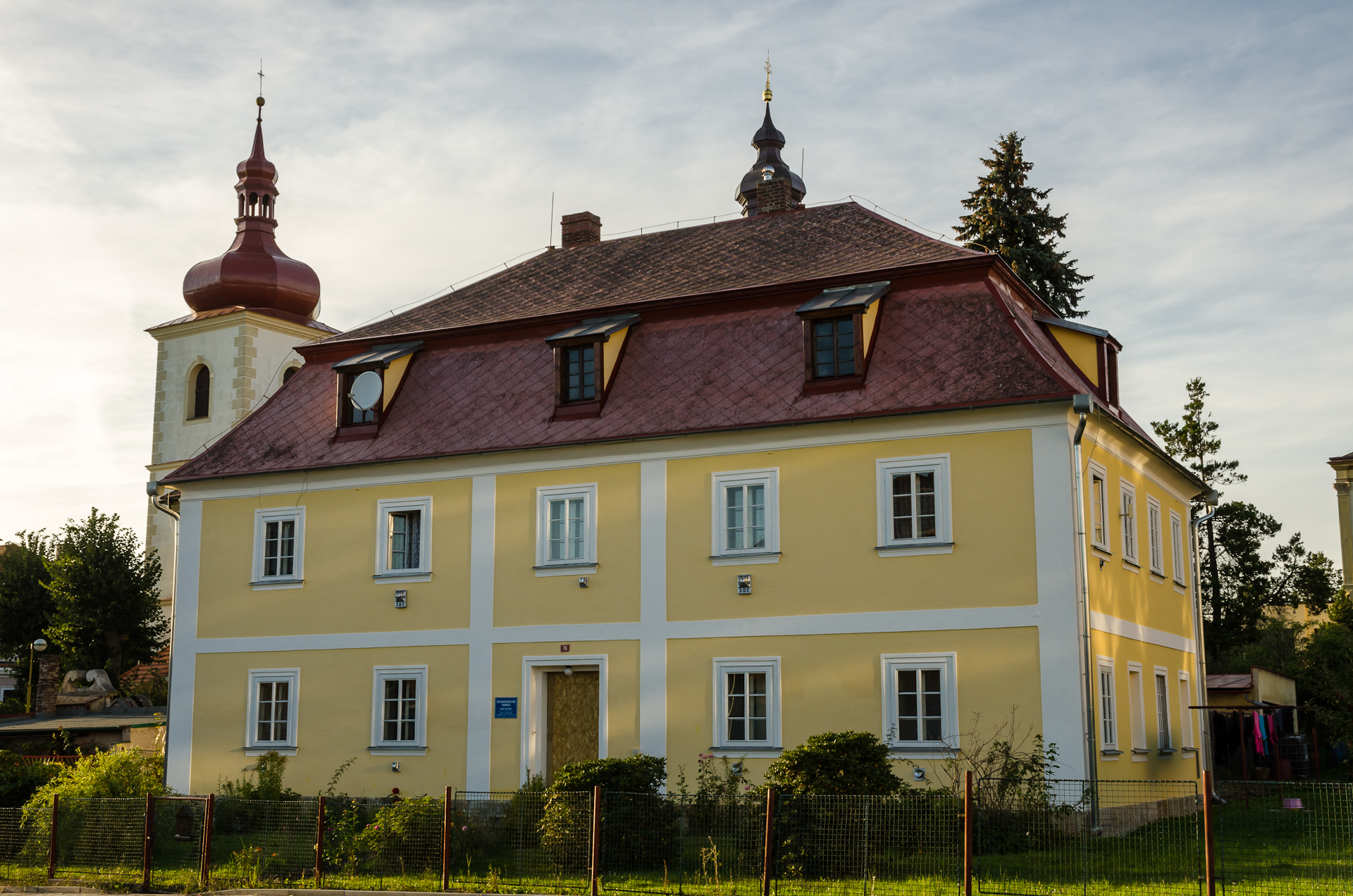 Fara (Hrádek nad Nisou), Hrádek nad Nisou 76